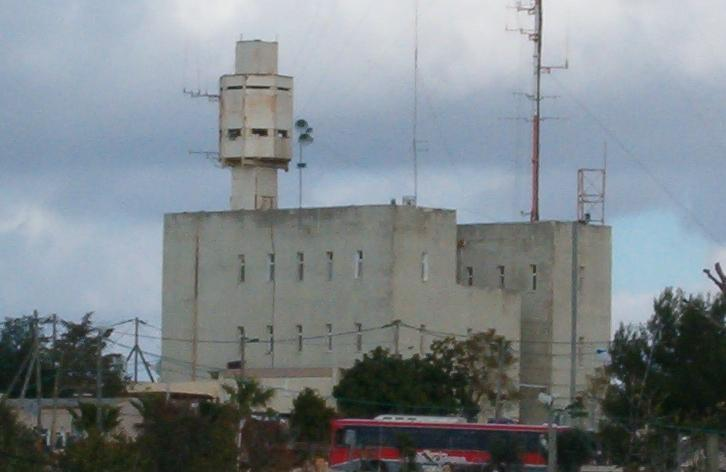 he:מצודת טגארט שהוקמה בכפר he:תרביחא (כיום המושב שומרה)